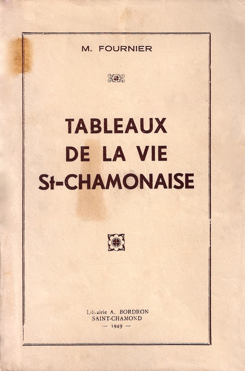 Mathieu Fournier, Tableaux de la vie saint-chamonaise, 1949 (couverture)